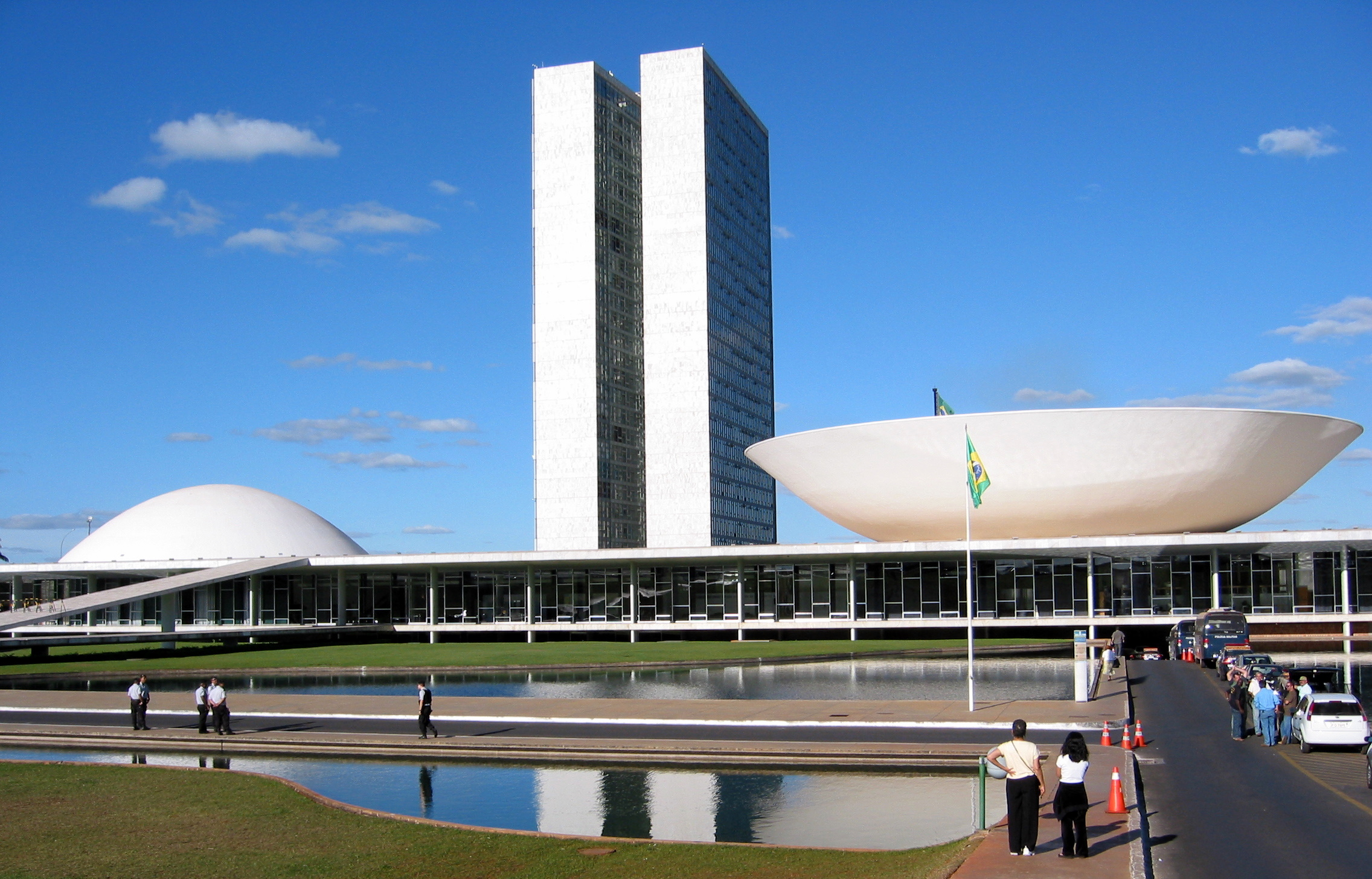 Congresso Nacional do Brasil, Brasília.